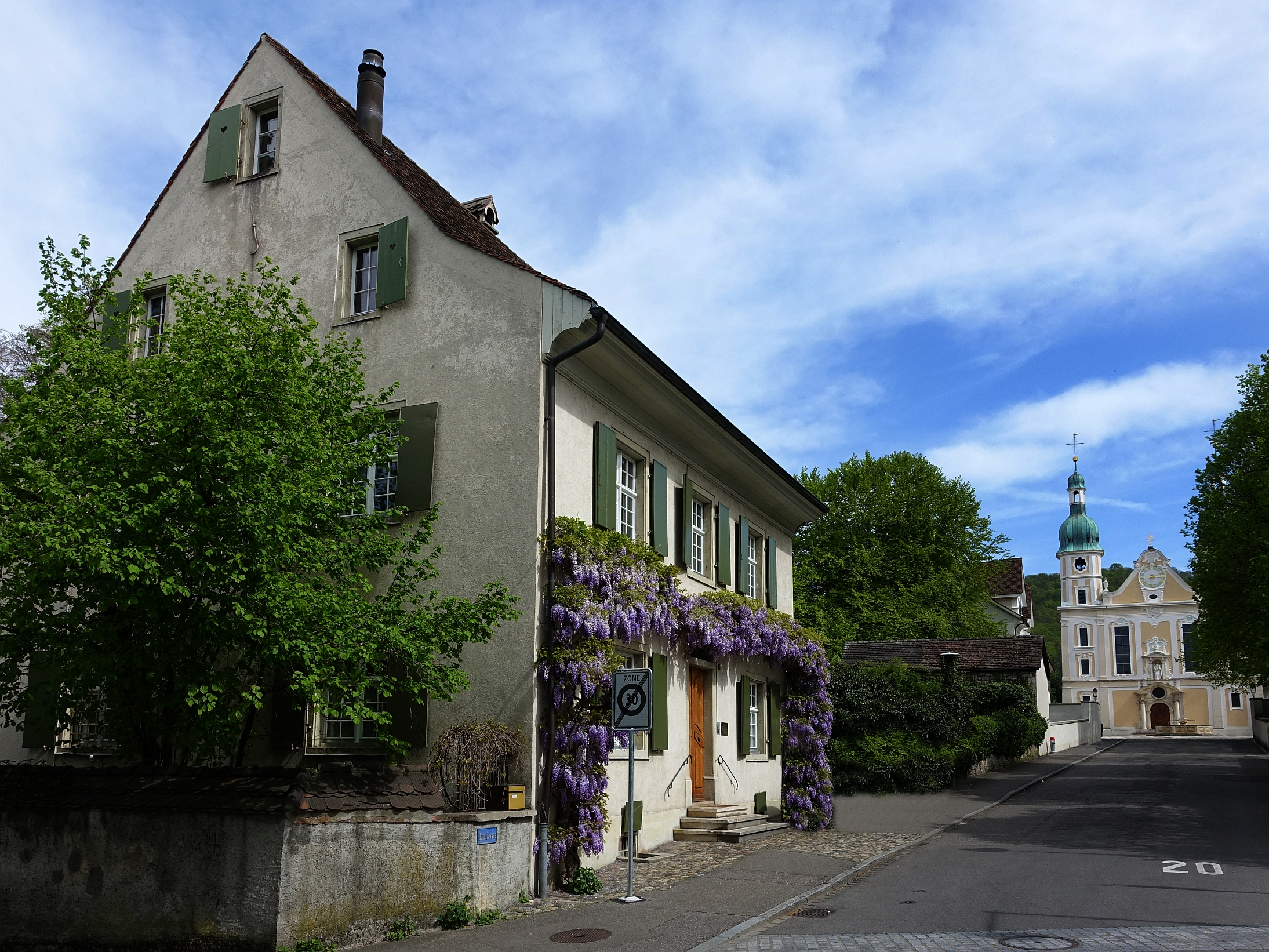 Emil Frey (1838–1922), Geburtshaus an der Domstrasse 3 in Arlesheim, Basellandschaft, Schweiz. Oberst im U.S Sezessionskrieg der Nordstaaten. Schweizer Bundesrat von 1890–1897. Schweizer Gesandter in Washington, Direktor der Internationalen Telegraphen-Union.